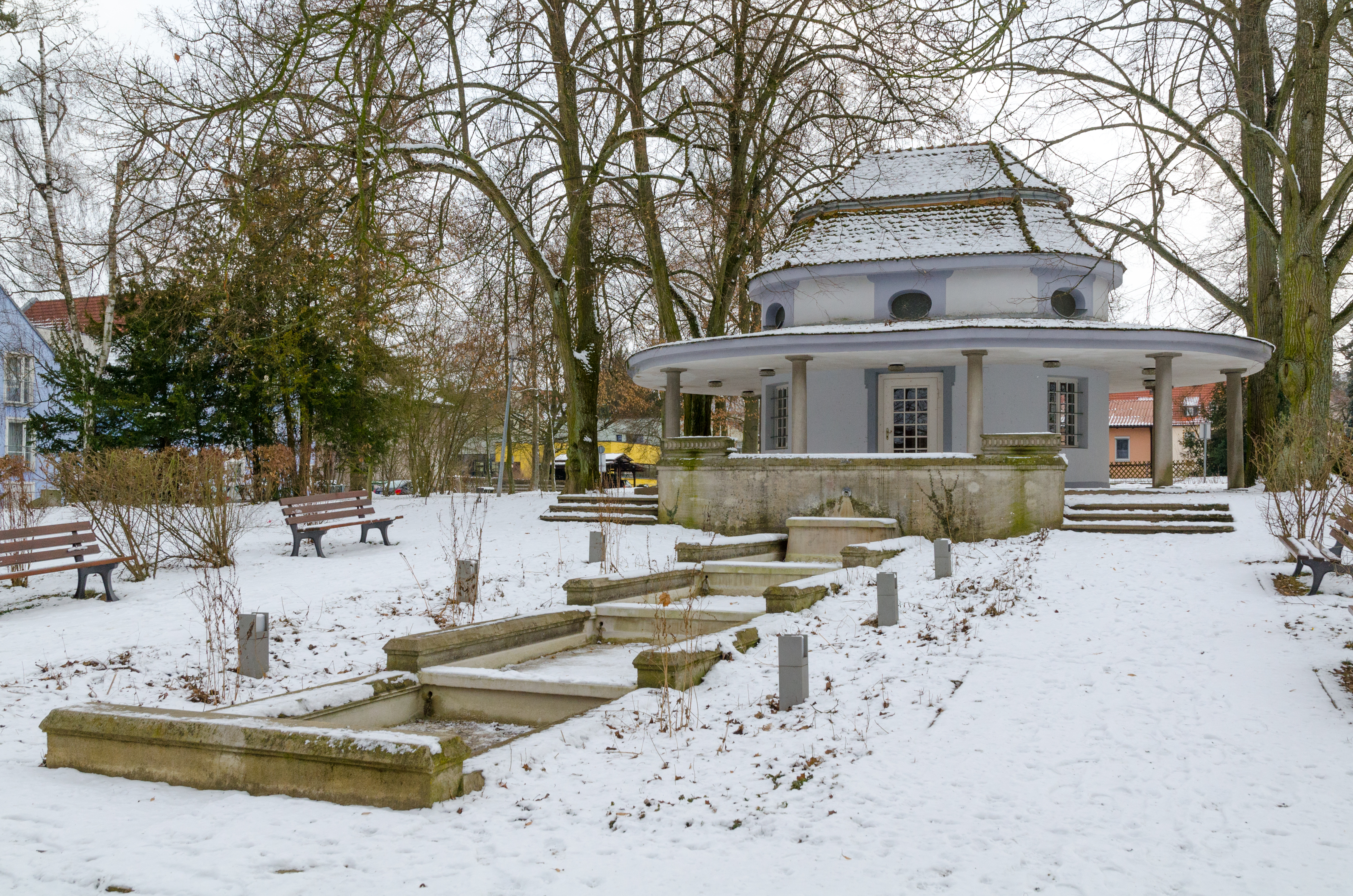 Neustadt an der Aisch, Luitpoldpark, Pavillon